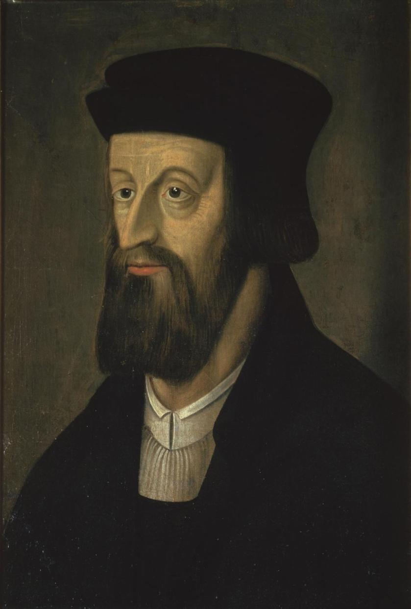 Domnělý portrét Jana Husa od neznámého autora z 16. století